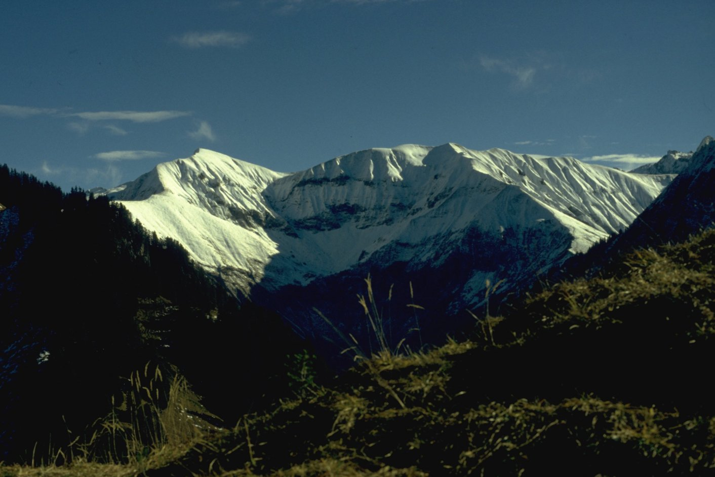 Raueck und Kreuzeck vom Älpelekopf, Allgäuer Alpen, Deutschland.